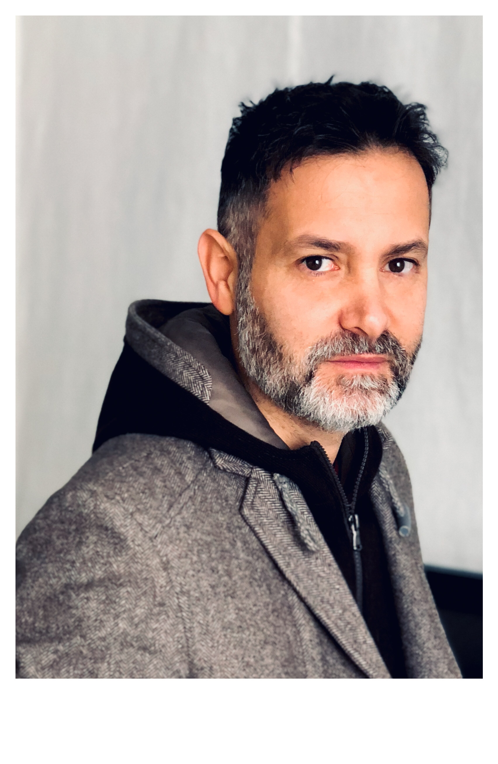 Emiliano Palmieri